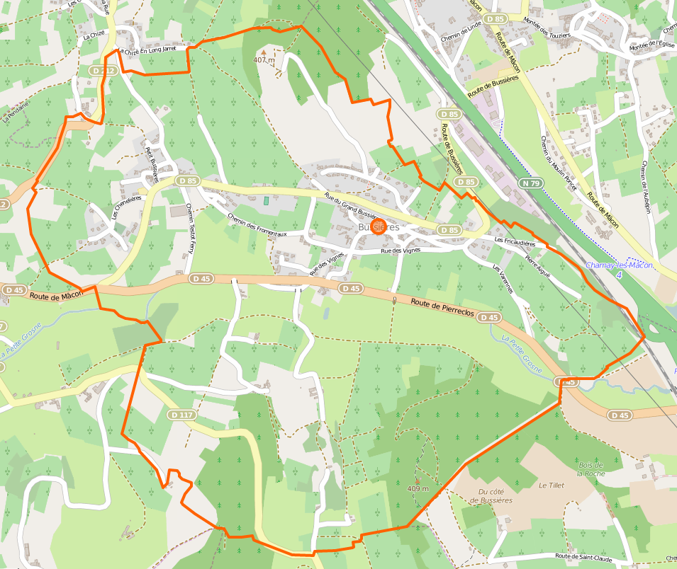 Karte der Gemeinde Bussières - INSEE-Code 71096 Carte de la commune de Bussières - Code INSEE 71096 This map may be incomplete, and may contain errors. Don't rely solely on it for navigation.